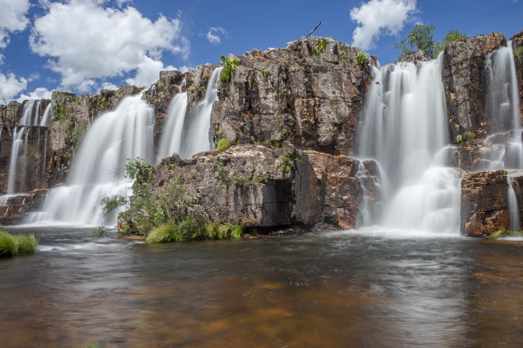 Cachoeira dos Couros situada na Chapada dos Veadeiros em Goias.